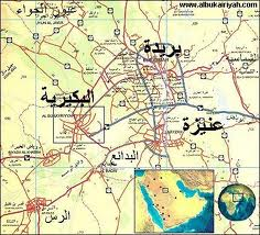 خريطة البكيرية